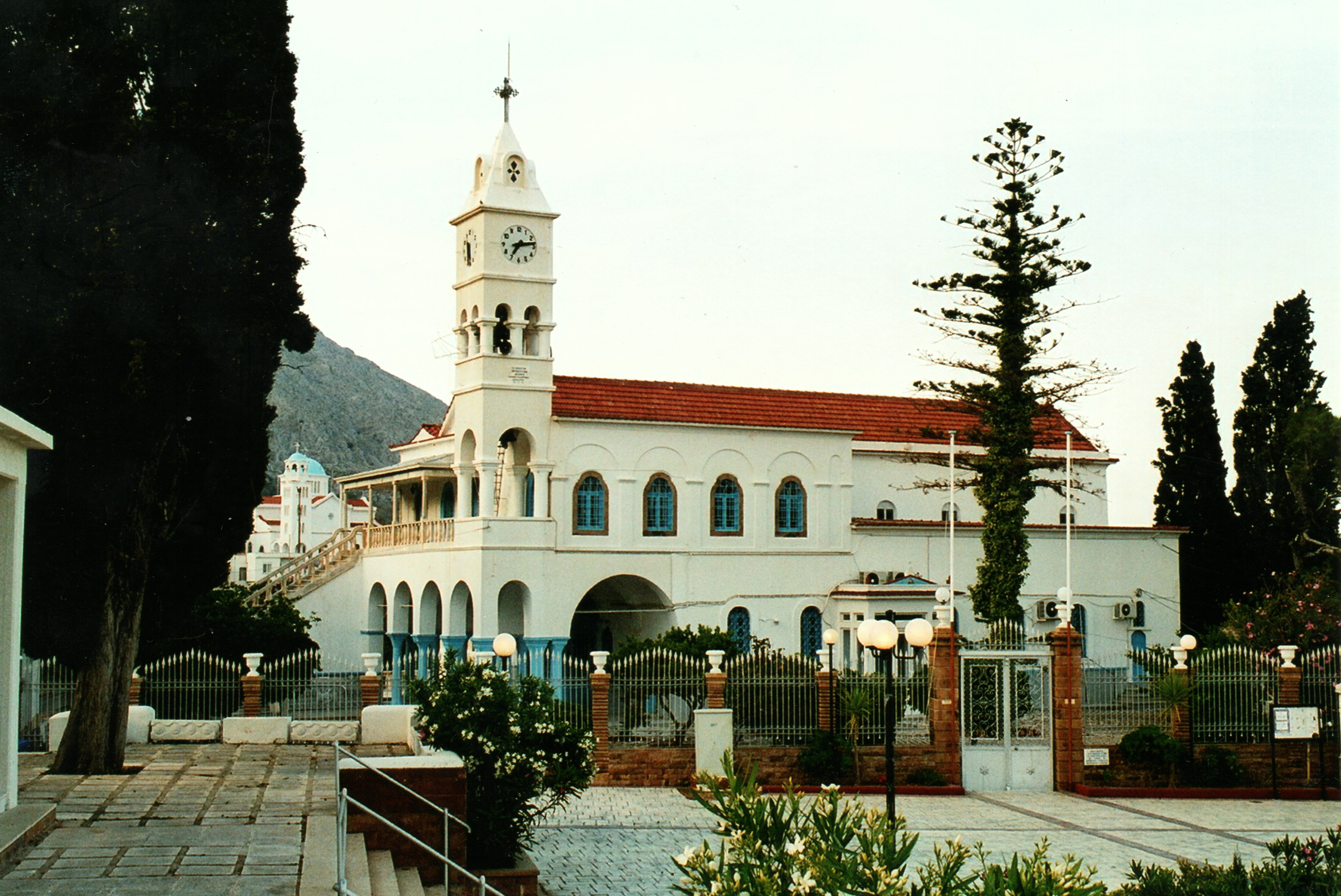 Chios, Vrontados, Marije Himelfearttsjerke